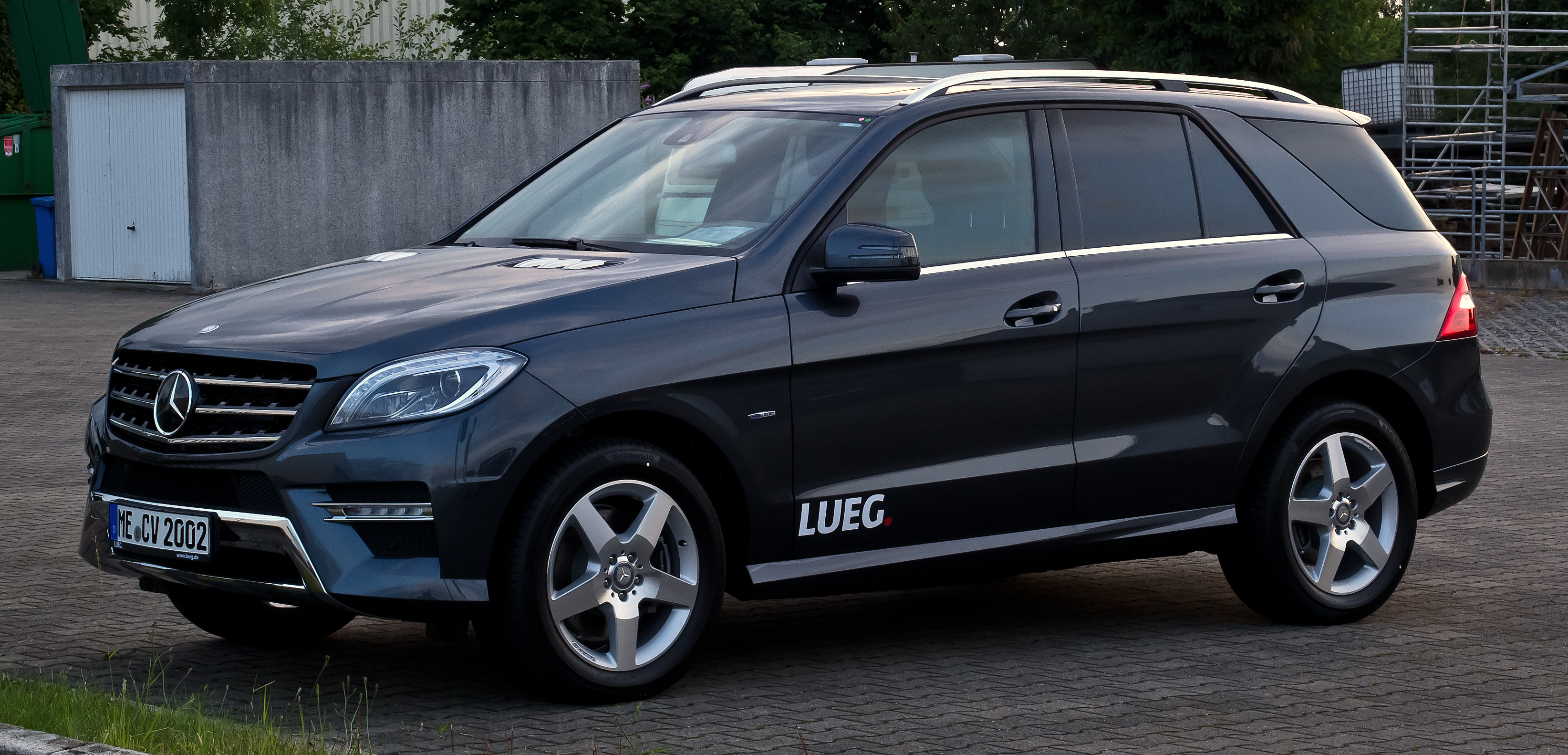 Mercedes-Benz ML 350 BlueTEC 4MATIC Sport-Paket AMG (W 166)